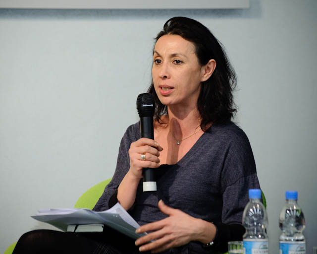 Shermin Langhoff auf der Podiumsdiskussion in der Heinrich-Böll-Stiftung: Vom Einwanderungsland zur Aufsteigerrepublik? Integration, Chancengerechtigkeit und Teilhabe in Deutschland; Foto: Stephan Röhl